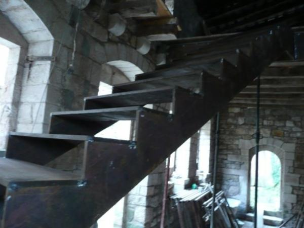 Escala d'acer oxitall de Castellnou de la Plana, obra de Guillermina Morales